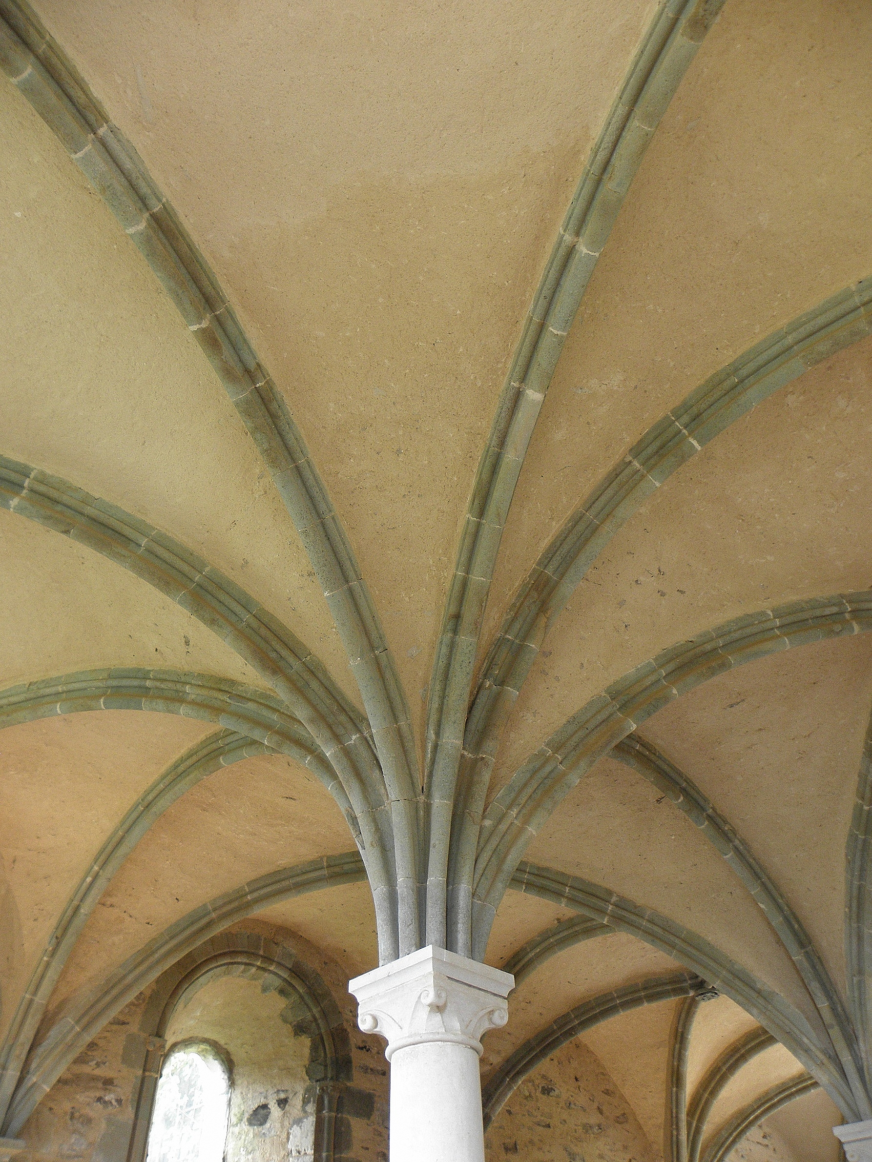 Voûtes de la salle capitulaire de l'abbaye de Beauport à Paimpol (22). .